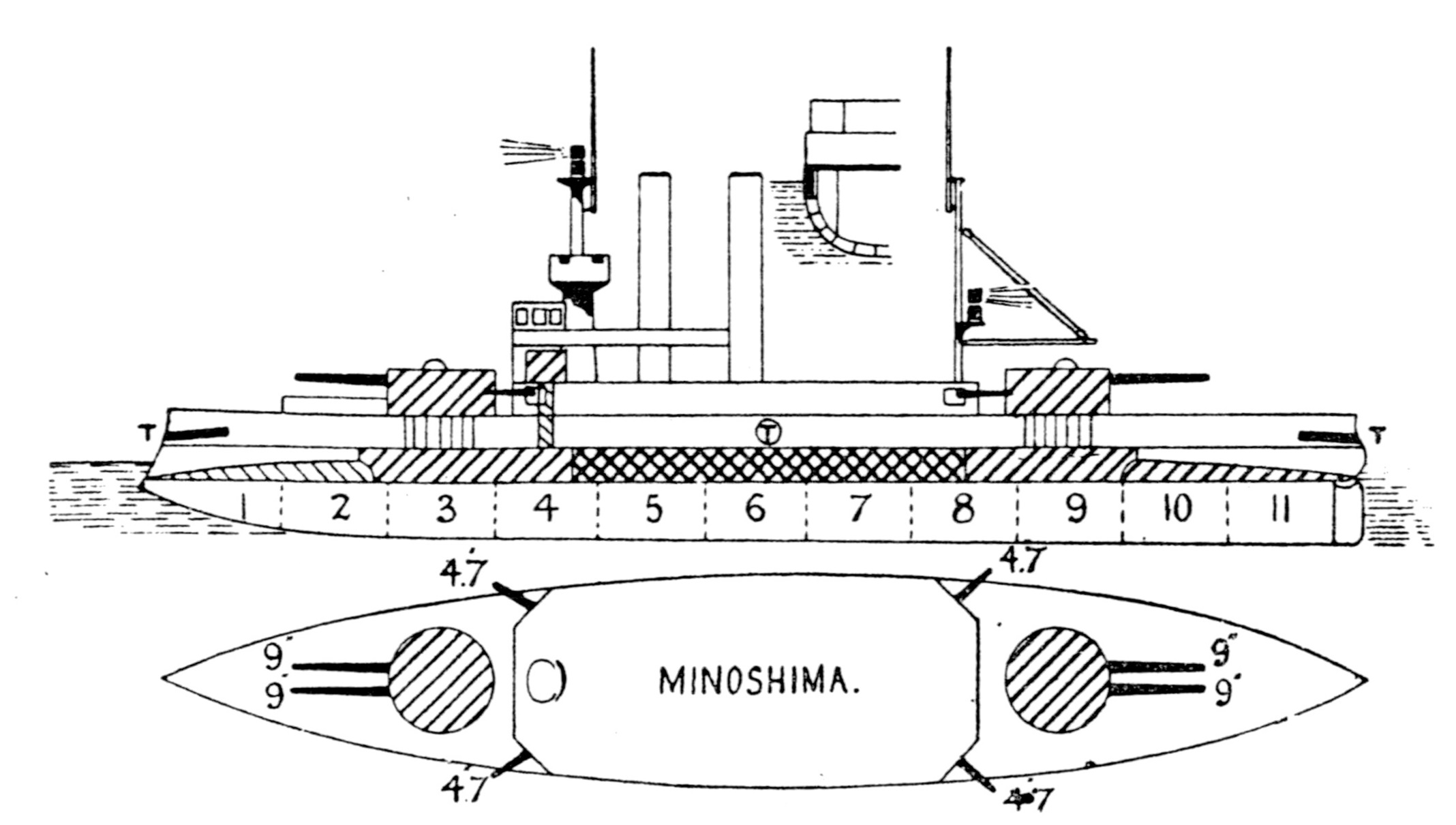 ロシアの海防艦「アドミラル・セニャーヴィン」、日本の海防艦「見島」